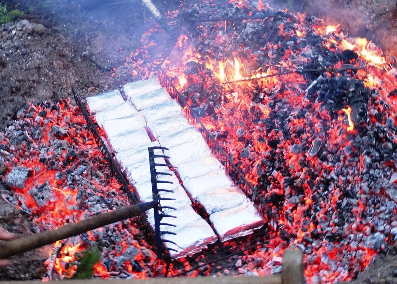 Absenken eines Drahtkorbes mit 20 Portionen Lakefleisch in die Glut. Das Fleisch ist in Alufolie eingewickelt und wird anschließend mit der Glut überschichtet.